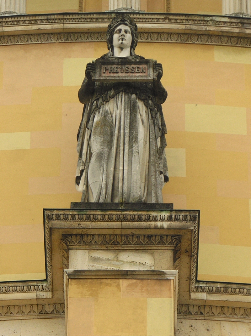 Diese Statue an der Aussenseite der Befreiungshalle in Kelheim steht für den Volksstamm der Preussen, Höhe der Statue 580 cm. Sie ist eine von 18 Statuen, die nach Modellen des Bildhauers Johann Halbig geschaffen wurden.